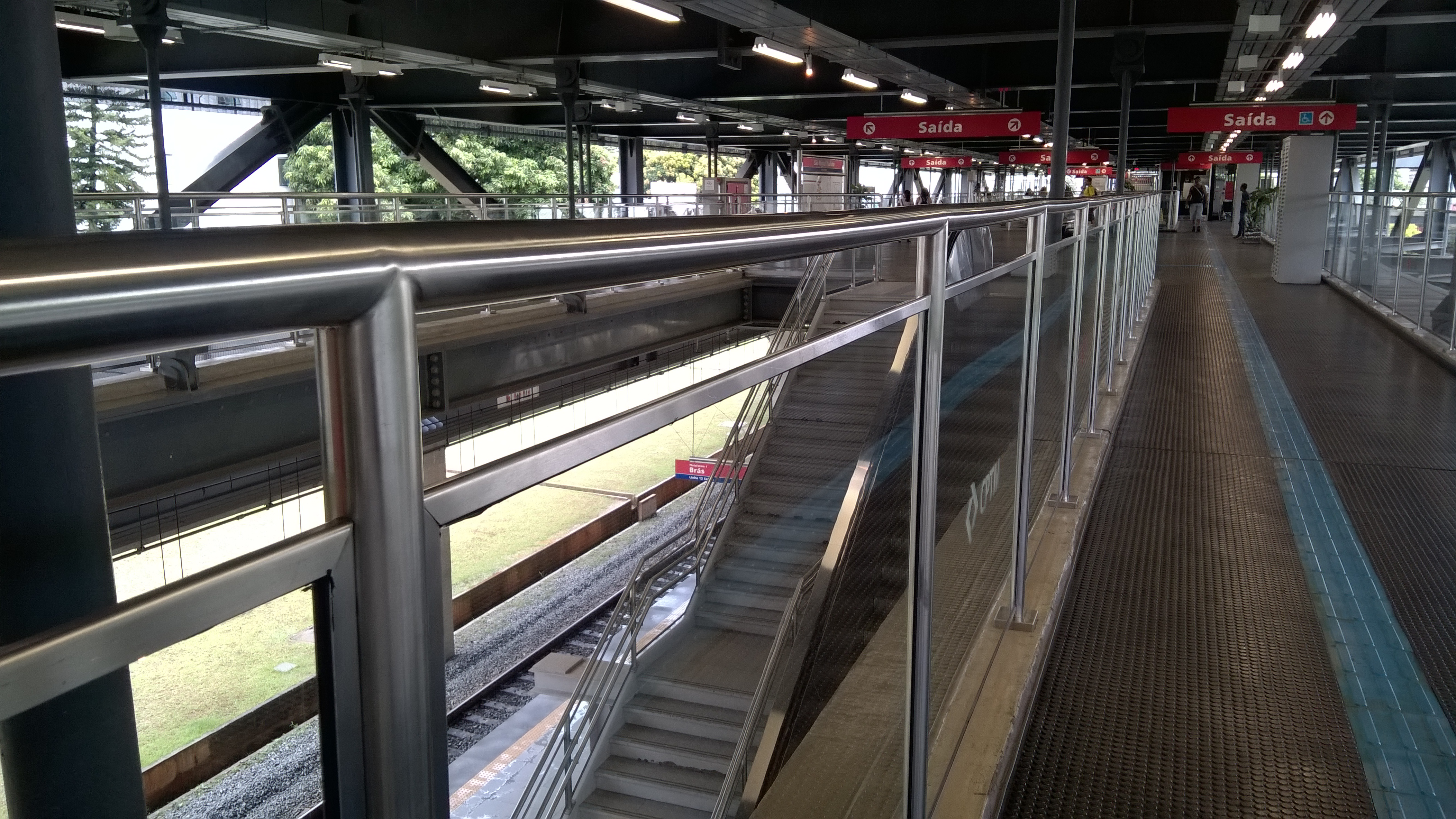 Detalhe da Estação São Miguel Paulista, em São Paulo.